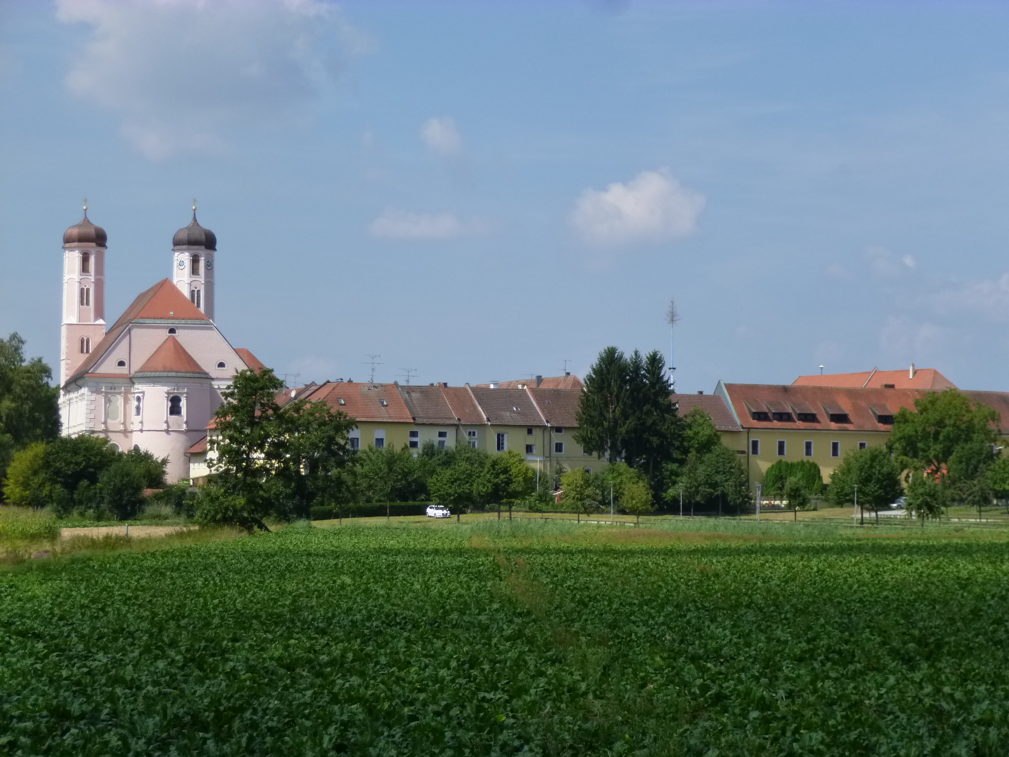 Blick von Osten auf den Klosterkomplex Oberalteich mit Klosterkirche und östlicher Klostermauer, Stadt Bogen. Liste der Baudenkmäler der Stadt Bogen